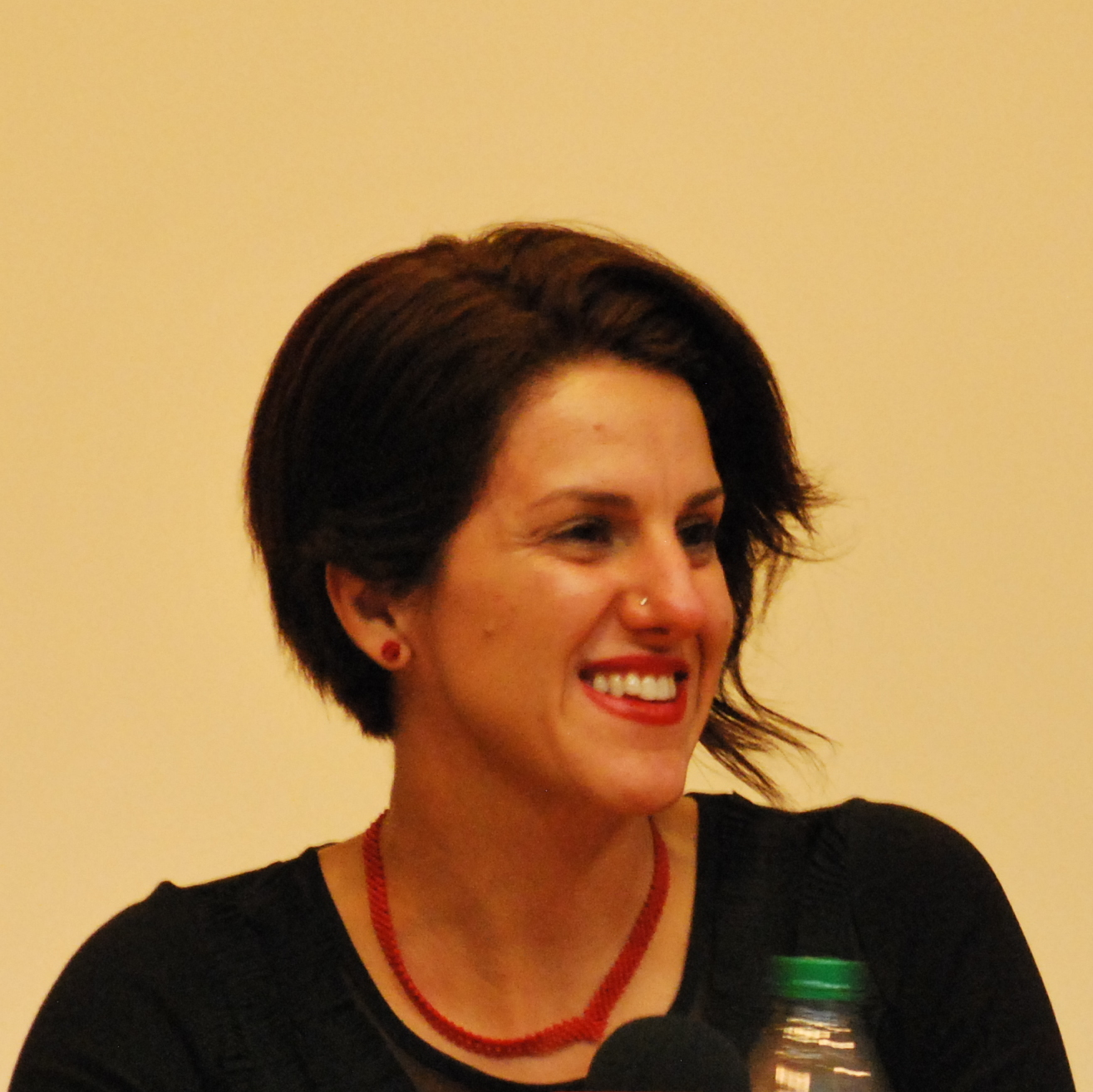 Djemila Benhabib